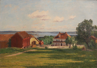 Maleri av Grimelund gård i 1880, malt fra gårdsplassen. Utsikt mot Oslofjorden.